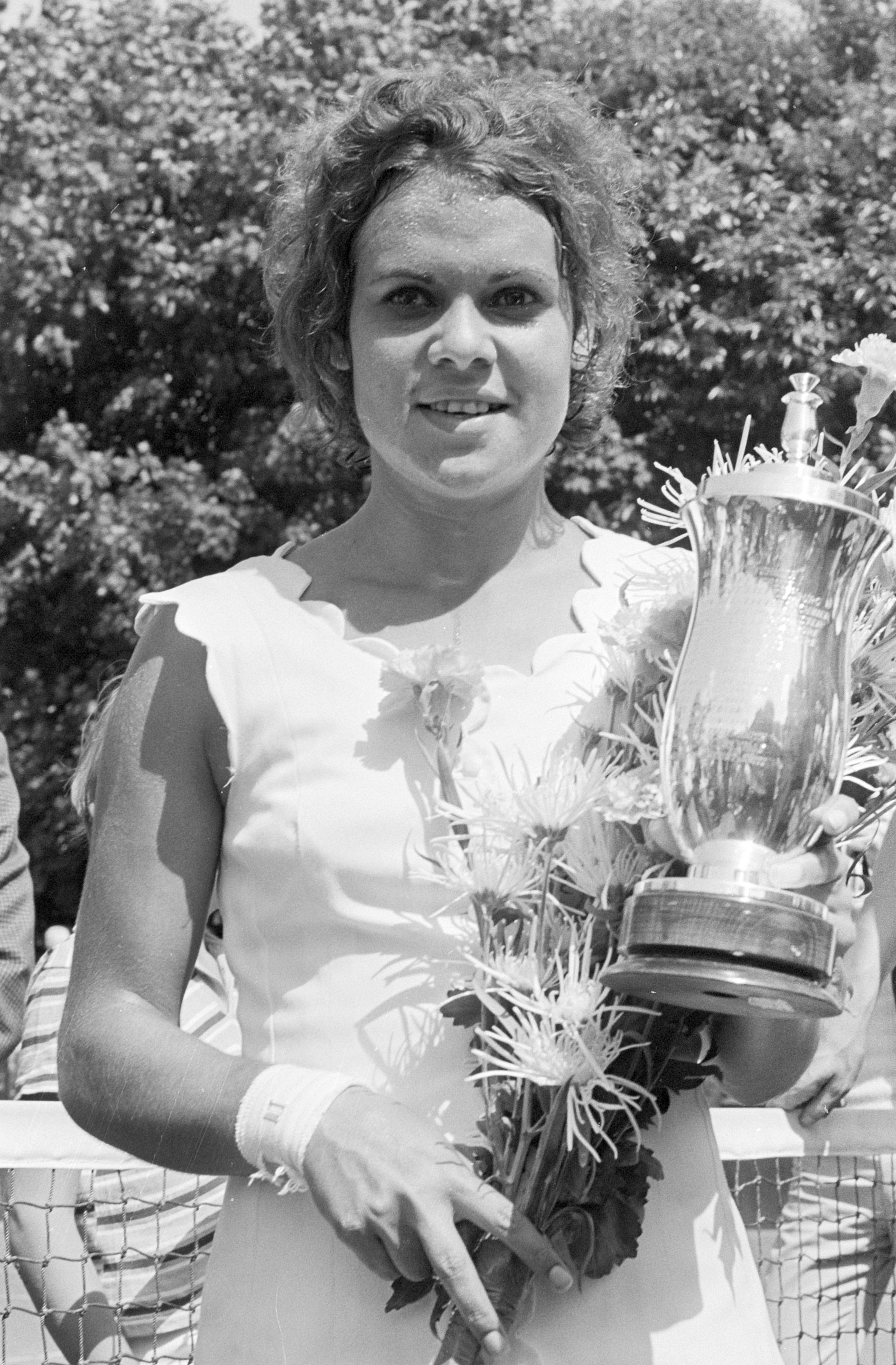 Internationale tenniskampioenschappen te Hilversum, Evonne Goolagong (winnares) met beker 1 augustus 1971